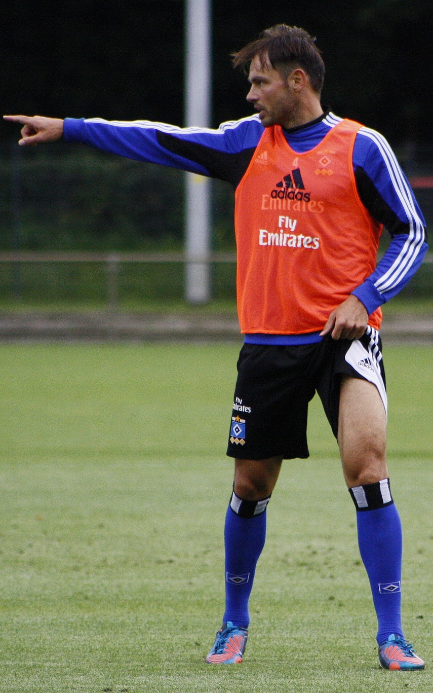 Heiko Westermann beim Training des HSV am 7. August 2012